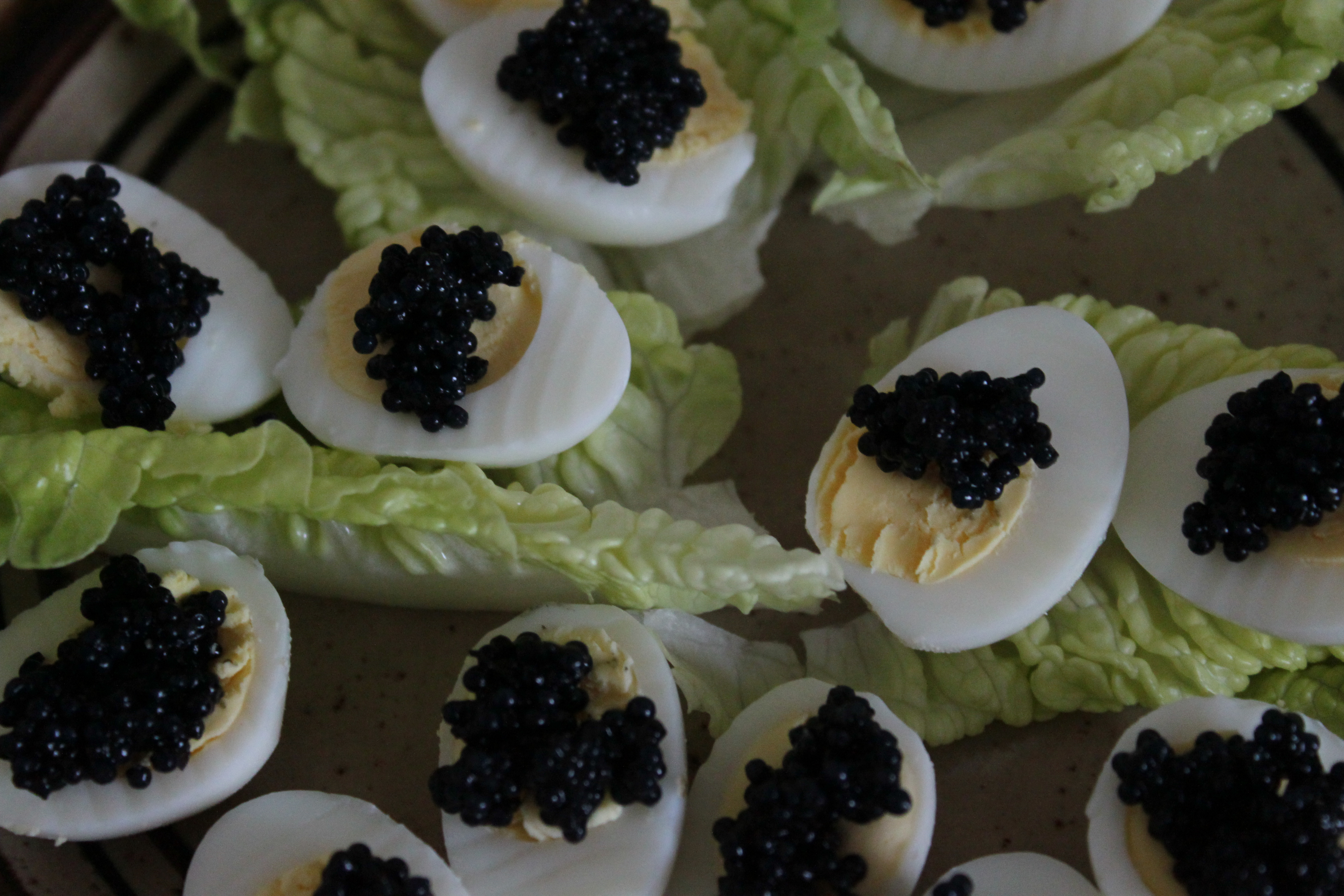 Kaviarersatz: Forellenkaviar; Kaviar aus Seehasenrogen